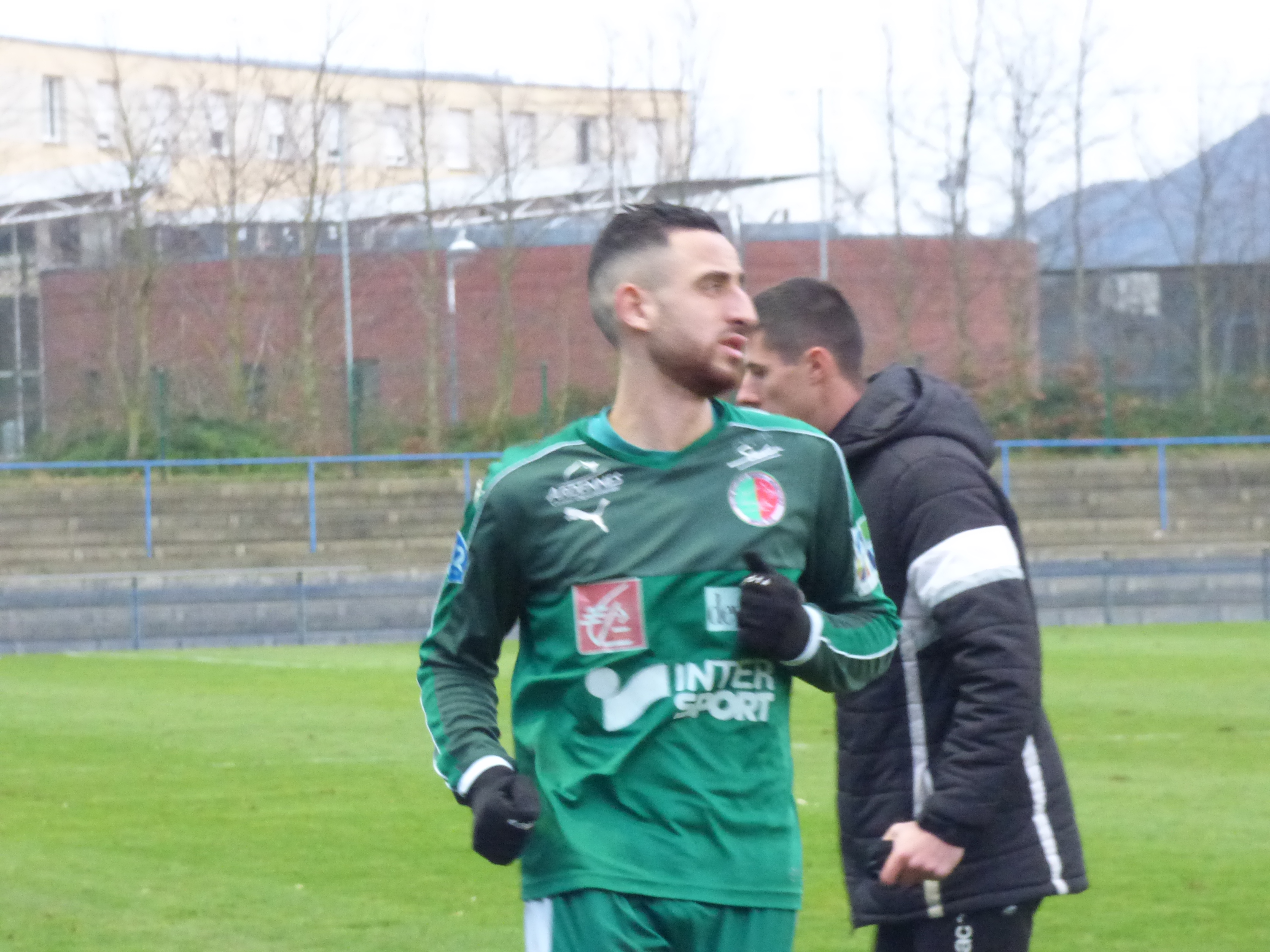 Mohamed Fadhloun lors du match Lens B / Sedan, comptant pour la quatorzième journée du Championnat de France de football de National 2 (4ème division française) 2017-2018 au Stade François-Blin d'Avion le 27 janvier 2018.